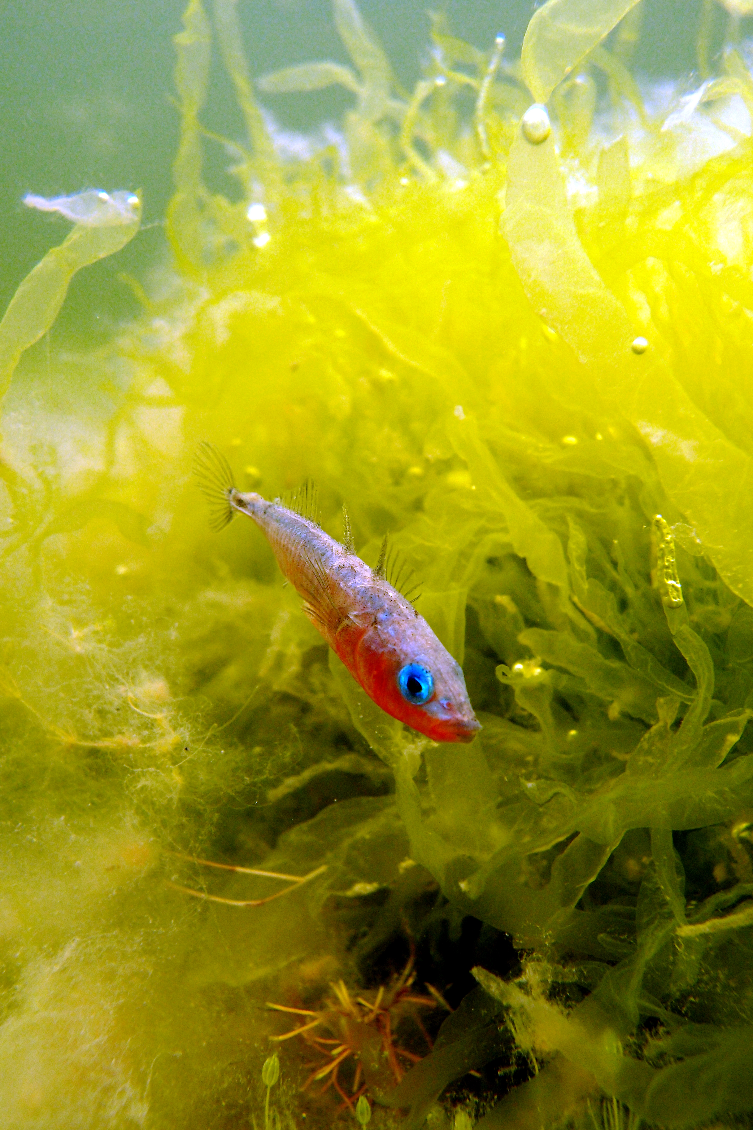 Pulmarüüs isane ogalik ehitab tulevastele pesa. Pildistatud läänerannikul Haapsalu läheduses.